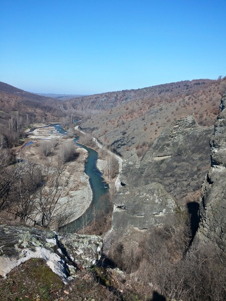 Reka Pcinja kod sela Donja Trnica